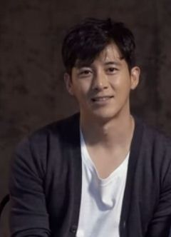 actor surcoreano Go Soo en 2017